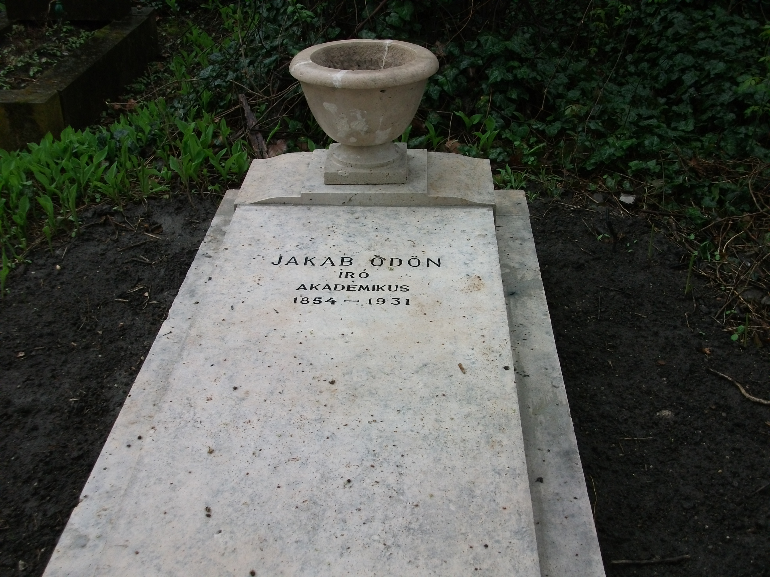 Jakab Ödön író, költő sírja a Kerepesi Temetőben. 2010. A sír felújítása után.